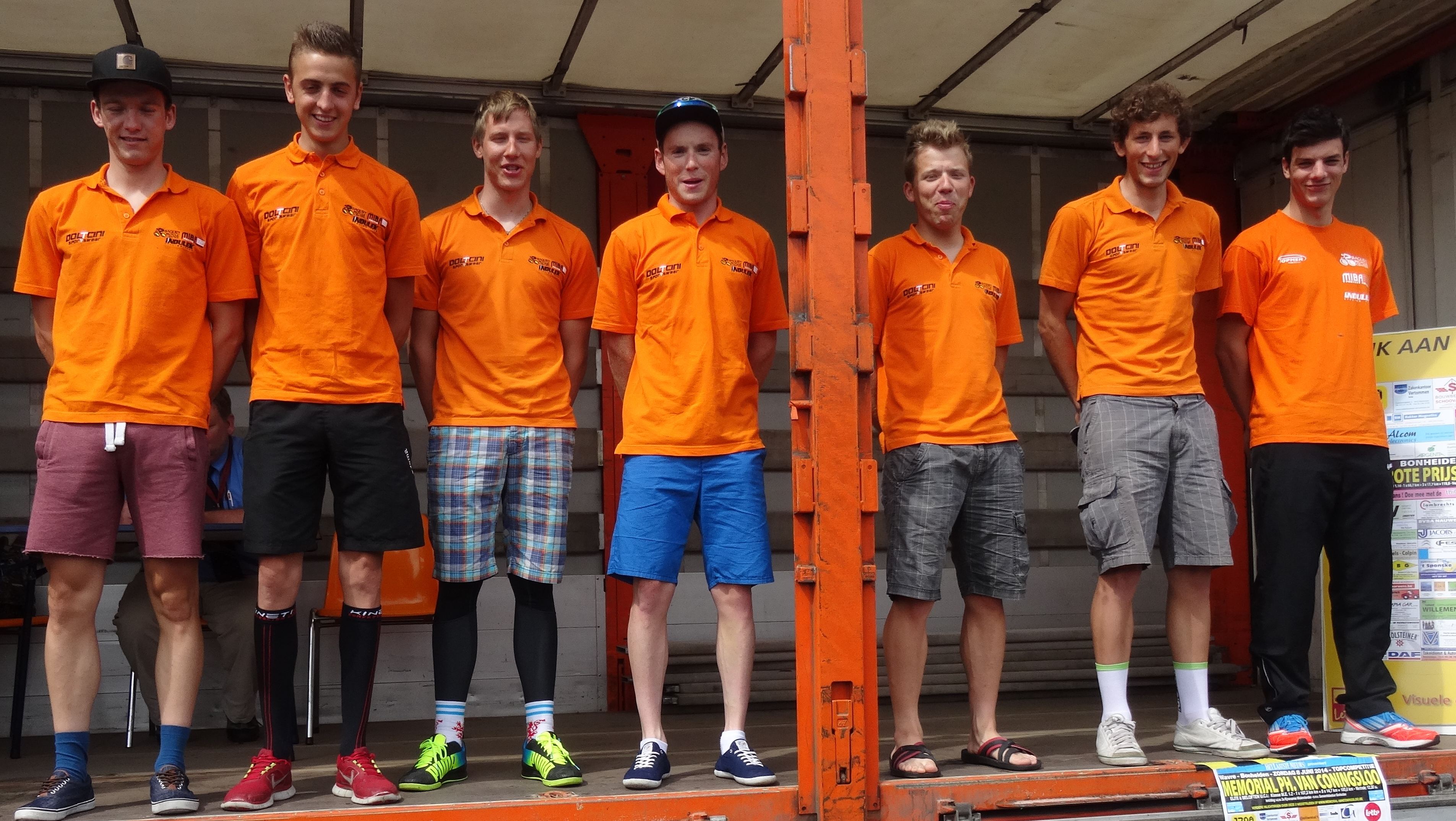 Reportage photographique réalisé le dimanche 8 juin à l'occasion du départ du Mémorial Philippe Van Coningsloo 2014 à Wavre, Belgique.